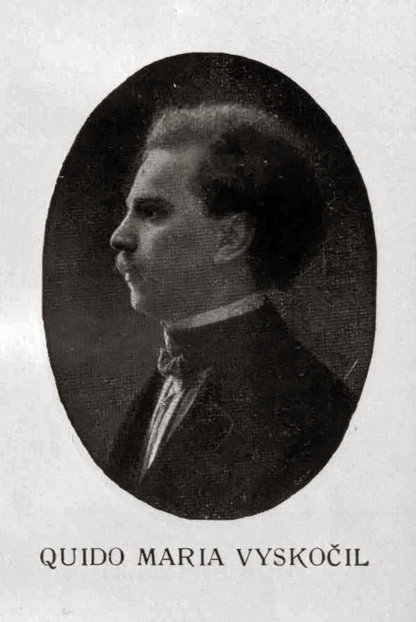 Quido Maria Vyskočil (1881 - 1969), Český spisovatel, básník a knihovník.